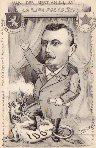 karikaturo de Jean-Robert pri Van der Biest-Andelhof, en bildkarto el ĉ. 1912